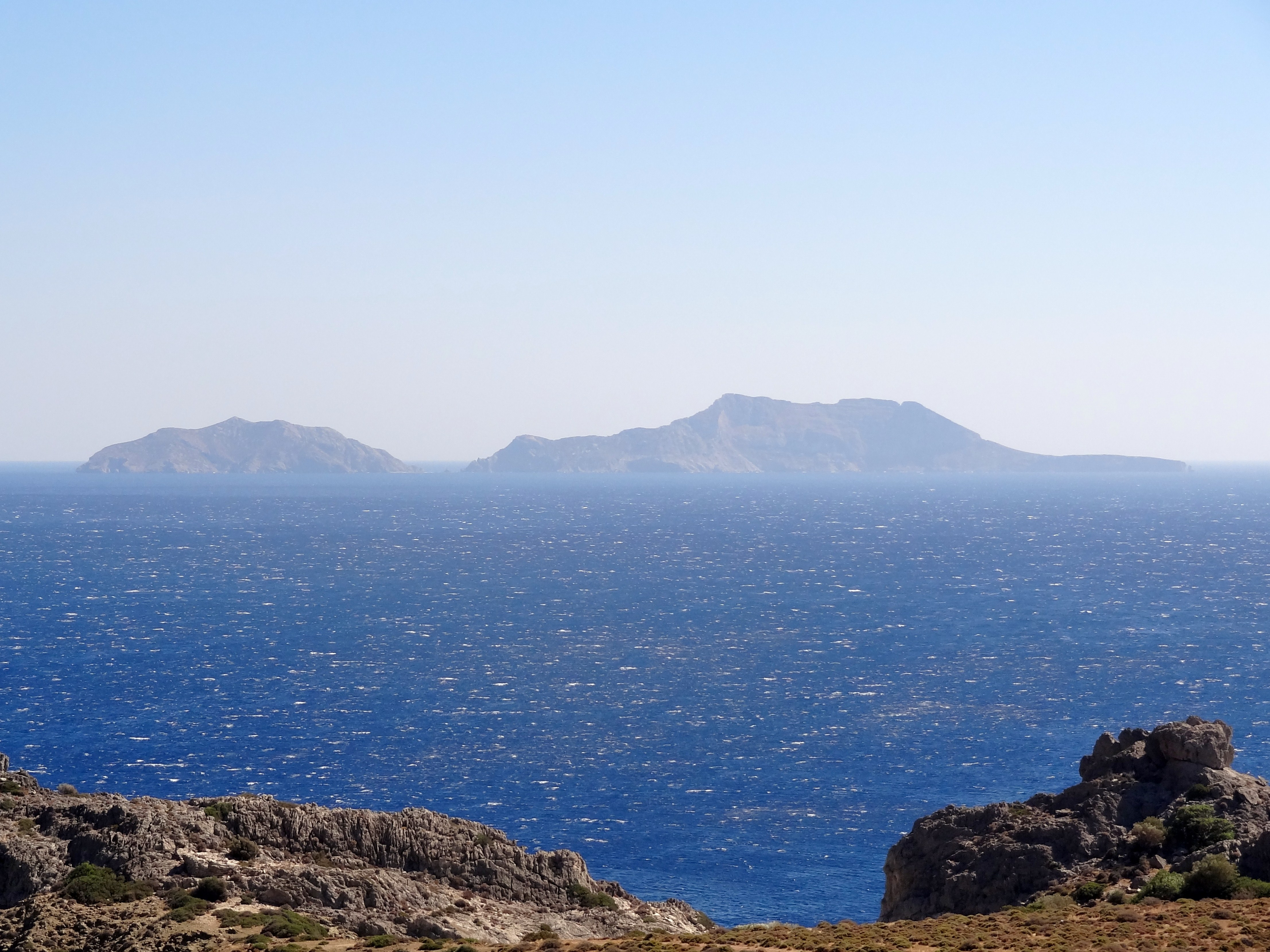 Paximadia (Παξιμάδια ‚Zwiebackinseln‘) von Kreta gesehen, Gemeinde Agios Vasilios, Regionalbezirk Rethymno, Kreta, Griechenland